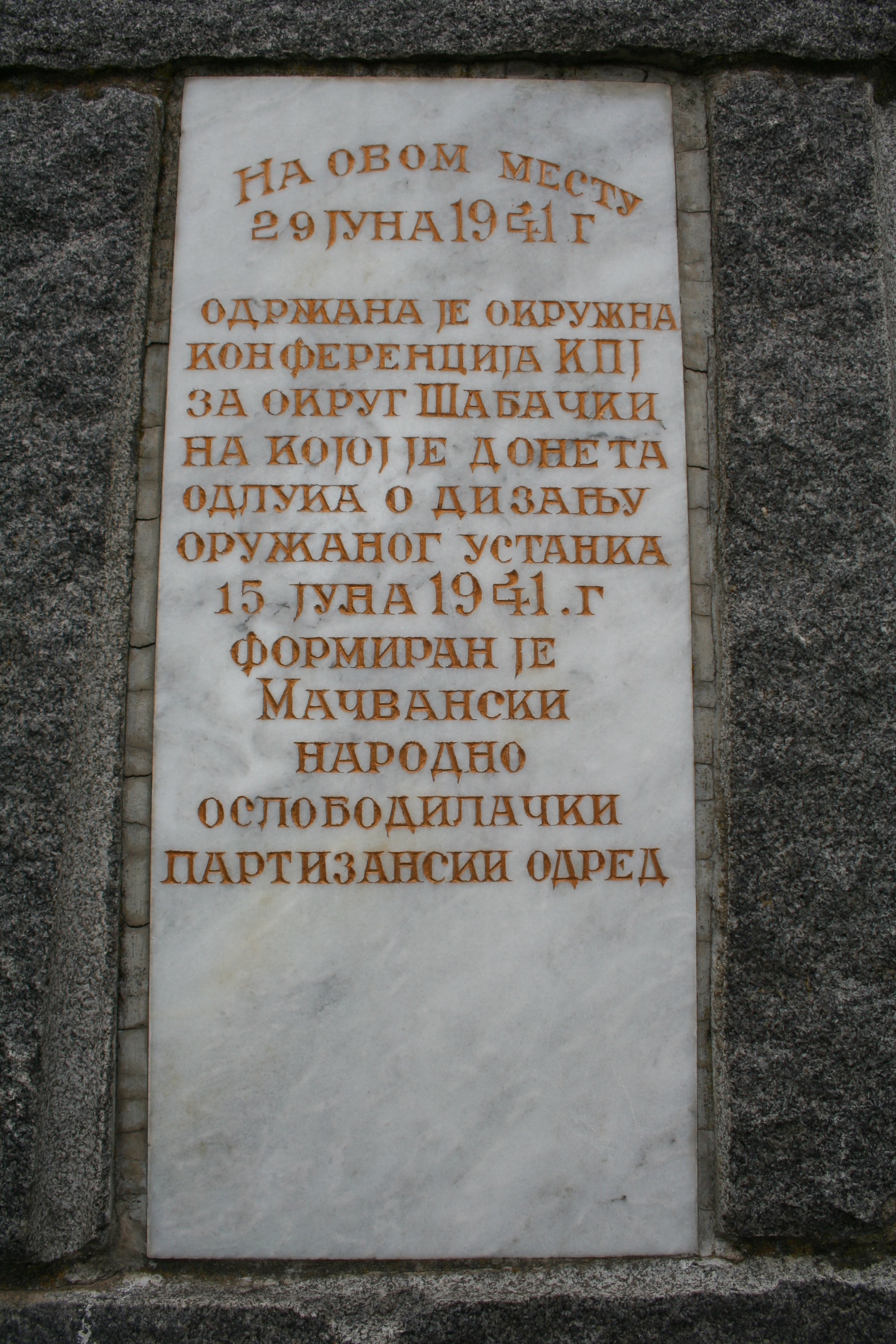 Spomenički kompleks "Bubanja" Glušci